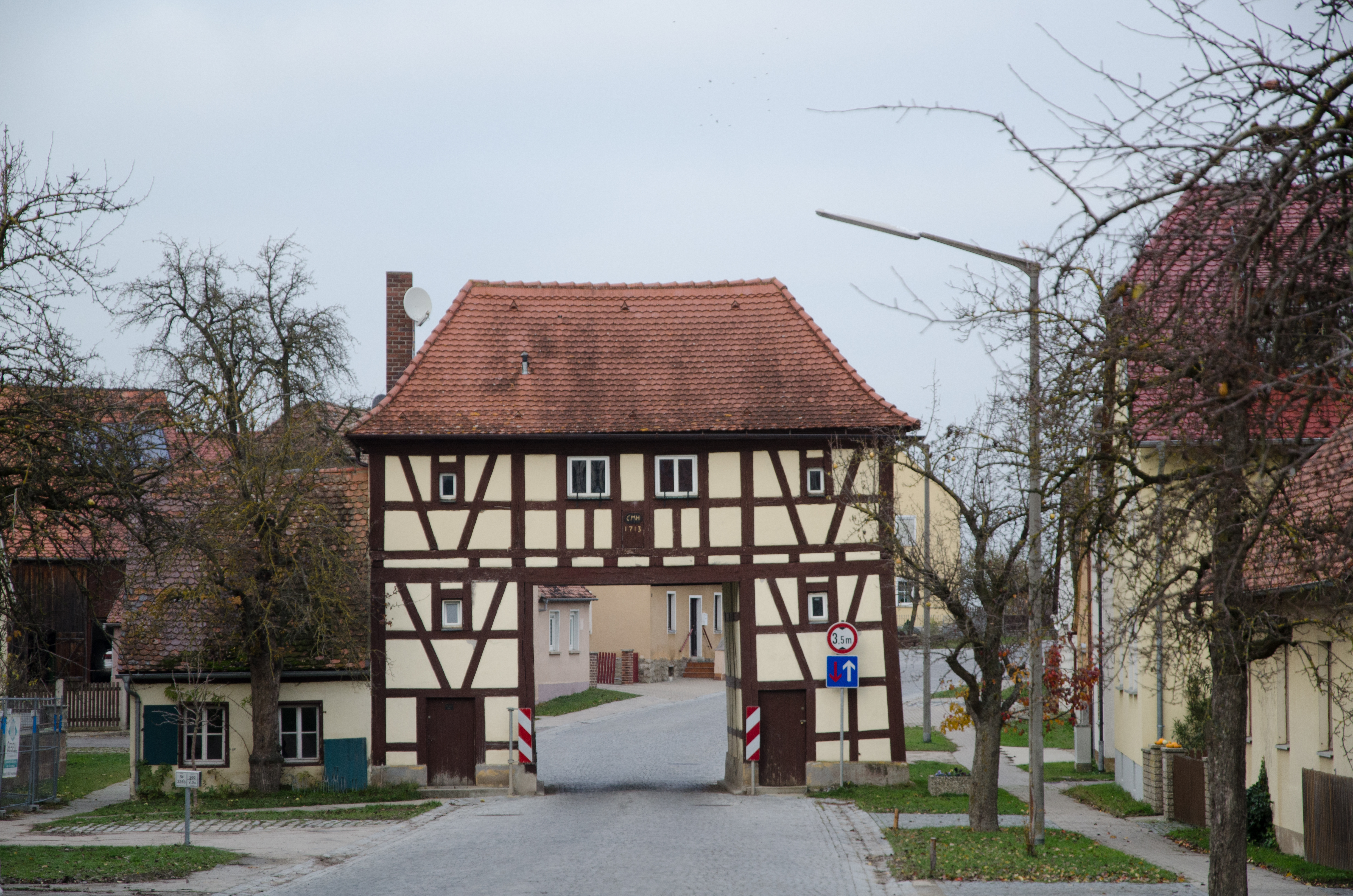 Ickelheim, Hauptstraße 16